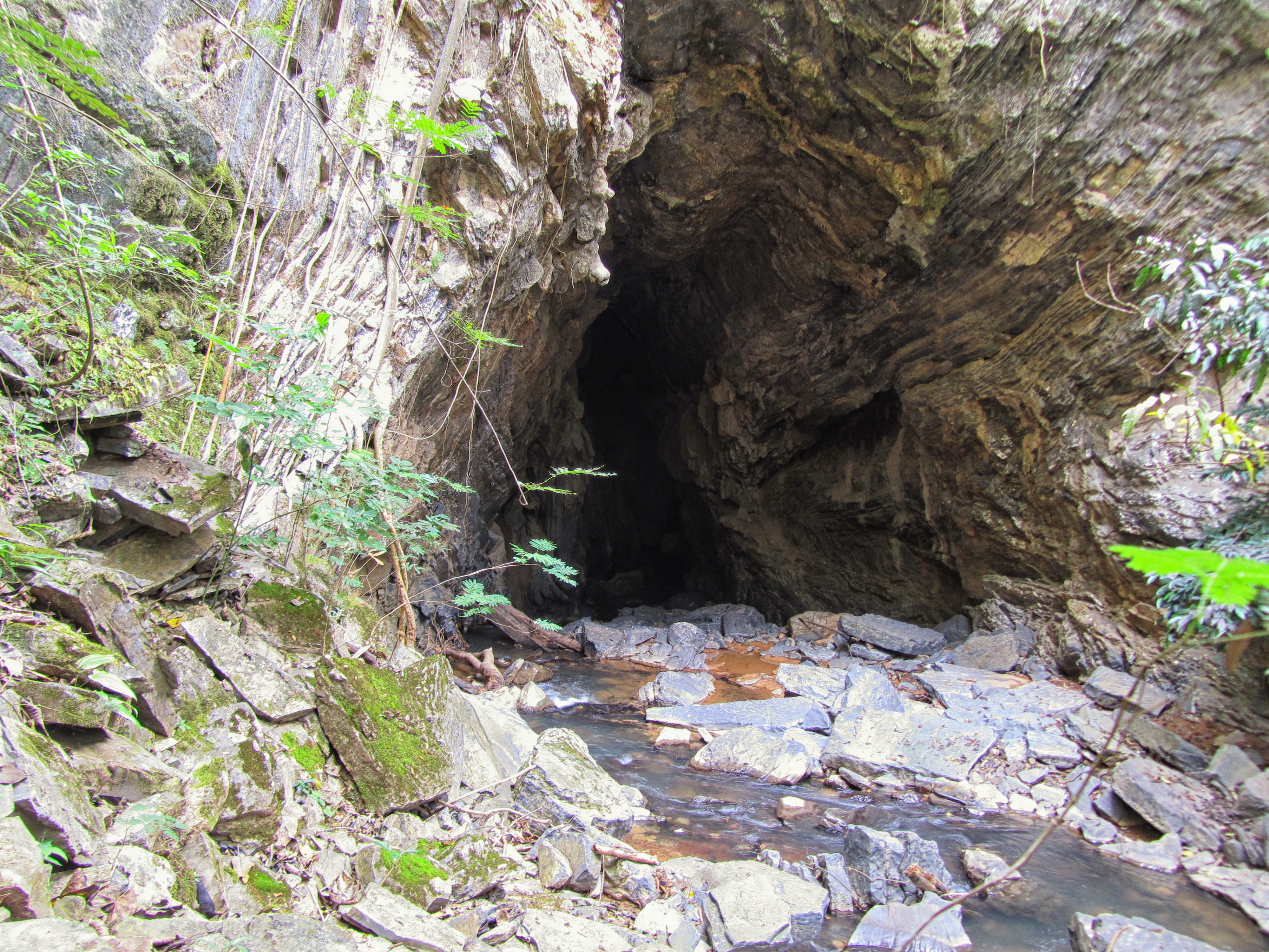 Entrada da Gruta da Jabuticabeira, possui cerca de 2km de extensão, com cachoeiras internas e poços. Ao final há uma última cachoeira com aproximadamente 8m de altura. Fica localizada próxima ao Distrito do Bezerra, em Formosa - GO - Brasil